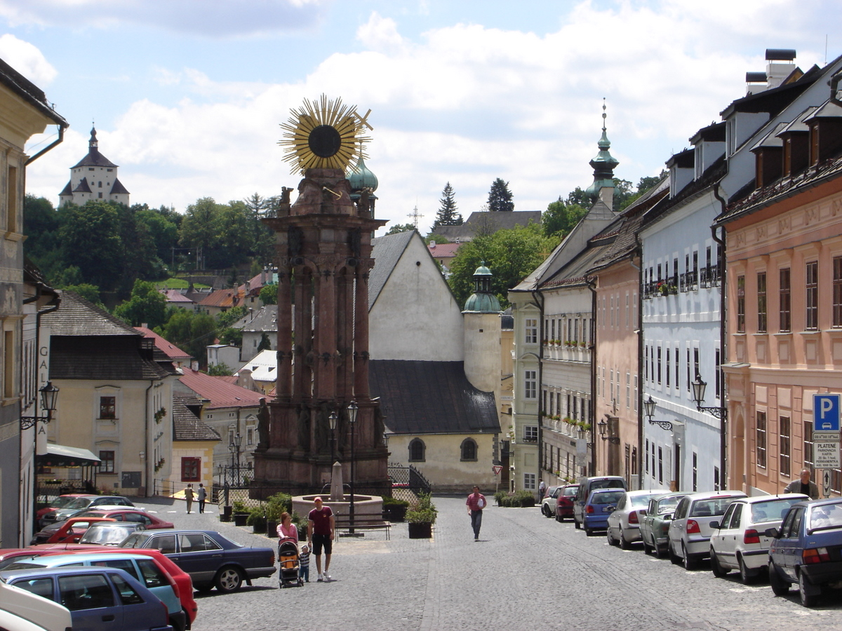 Trojičné námestie